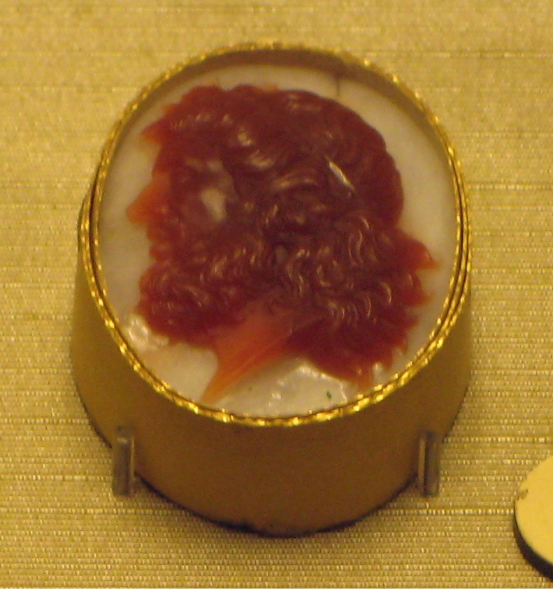 Камея. Голова Юпитера в диадеме. Екатеринбургская гранильная фабрика, 1827-8. Сердолик-оникс, резьба. Эрмитаж. Исполнена по слепку из серии Джеймса Тасси с инталии в стиле У. Паунелла, восходящей к типу Ю. Капитолийского.